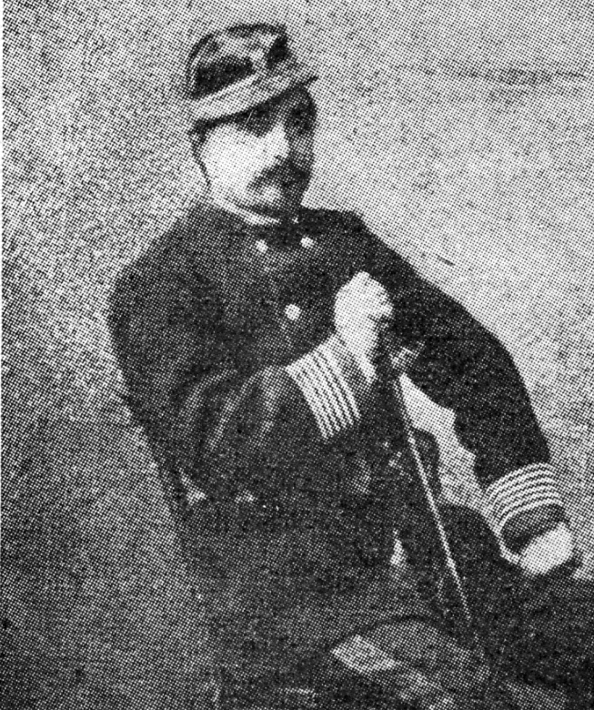 portrait d'Alphonse Lonclas